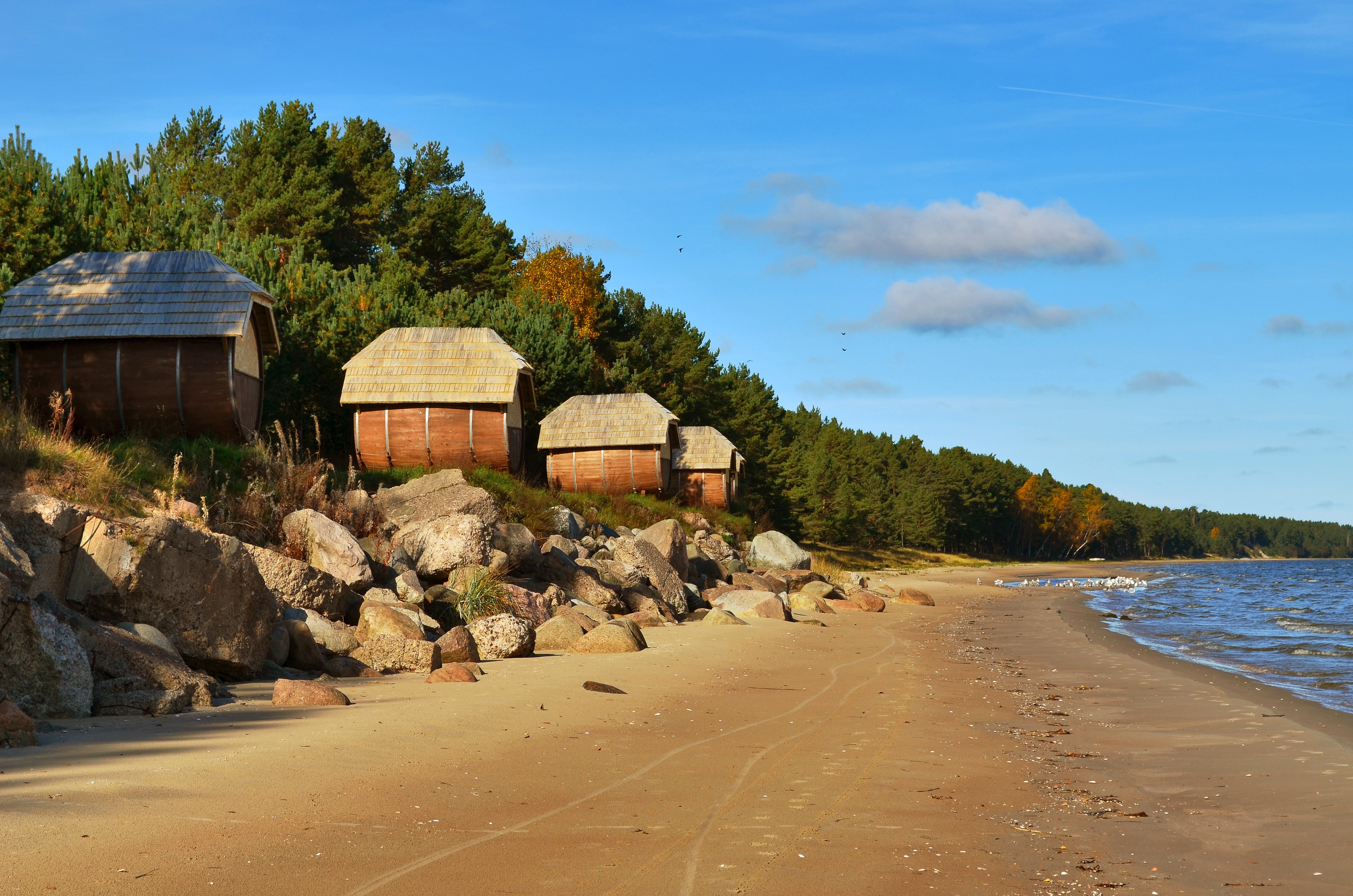 Melnsila kempings pie jūras